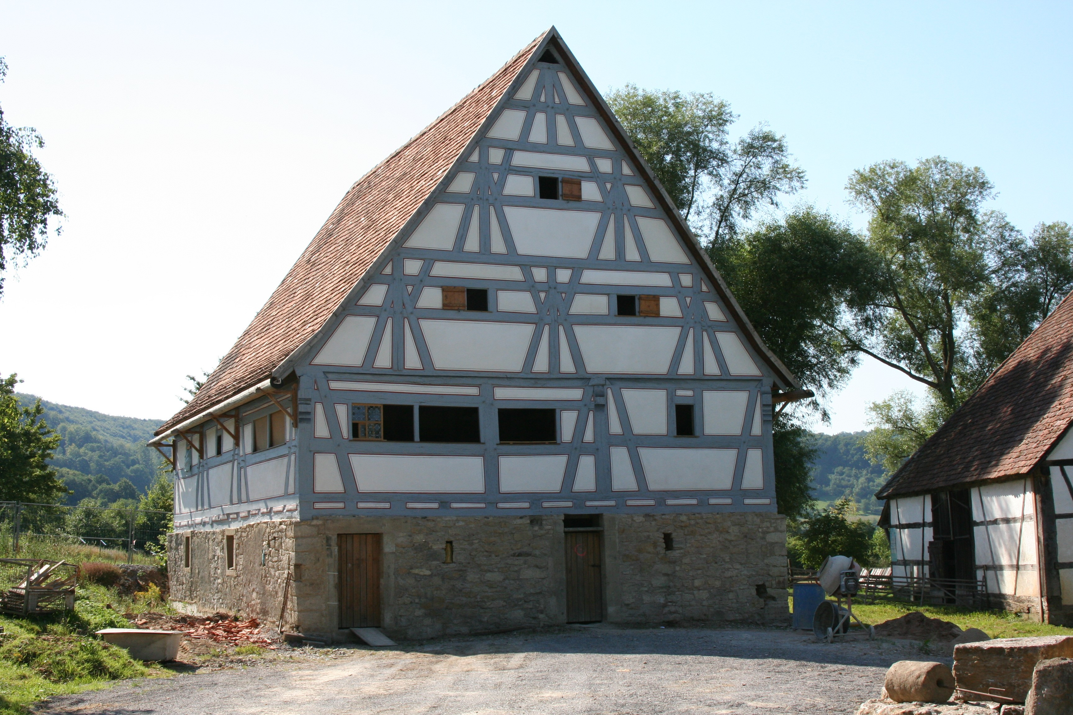 Spätmittelalterliches Bauernhaus aus Zaisenhausen im Freilandmuseum Wackershofen